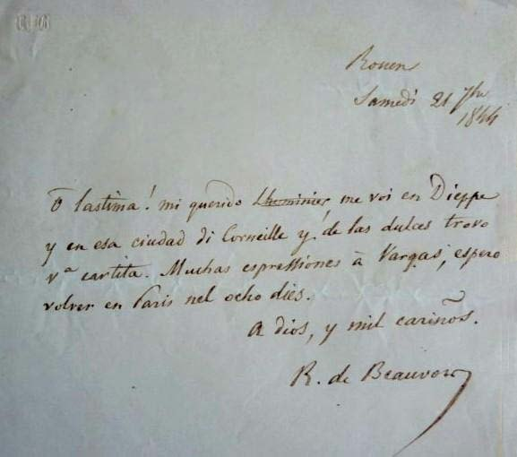 Роже де Бовуар. Стихотворение, 1844.